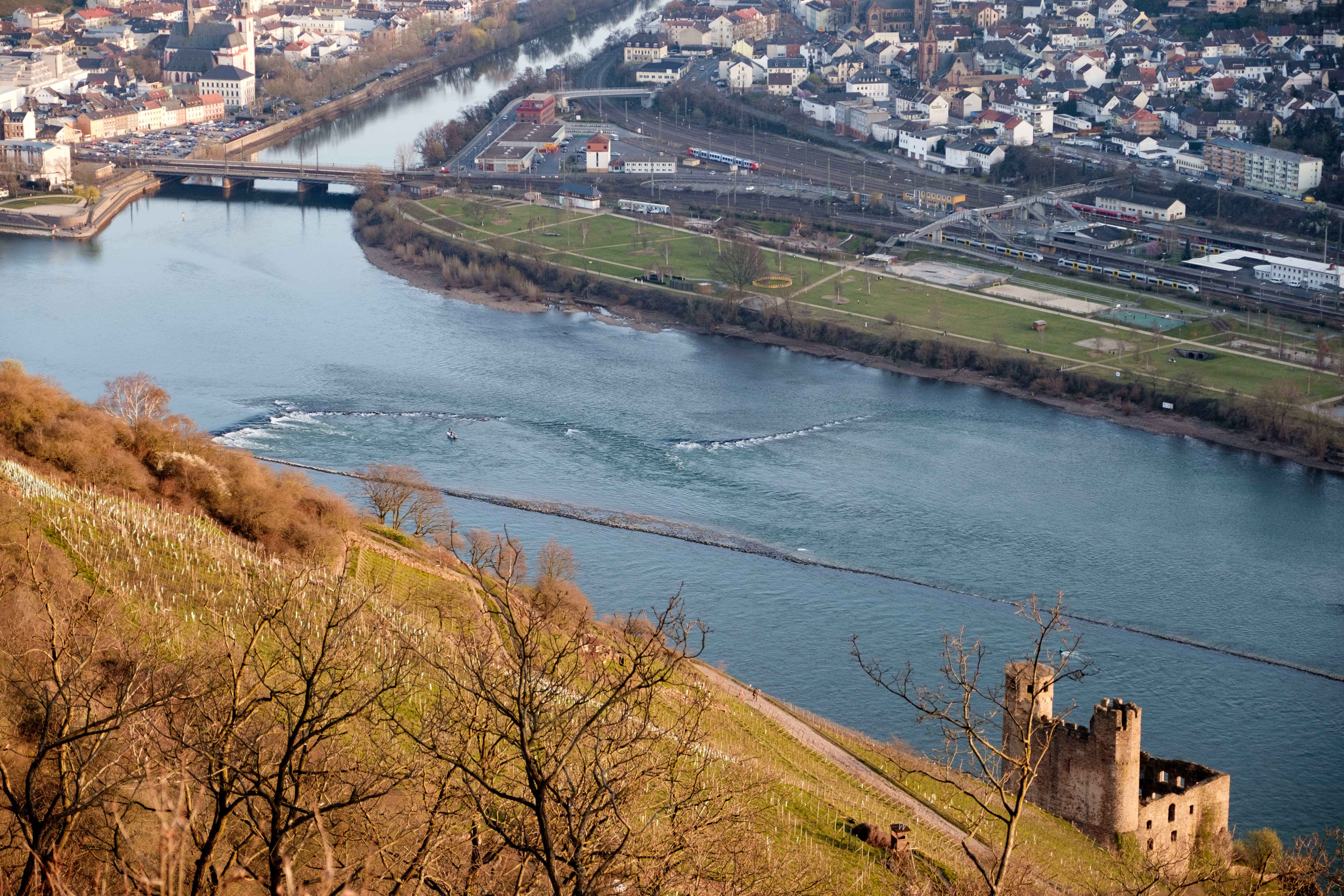 Rhein zwischen Nahemündung und Burg Ehrenfels, Blick vom Aussichtspunkt Rossel